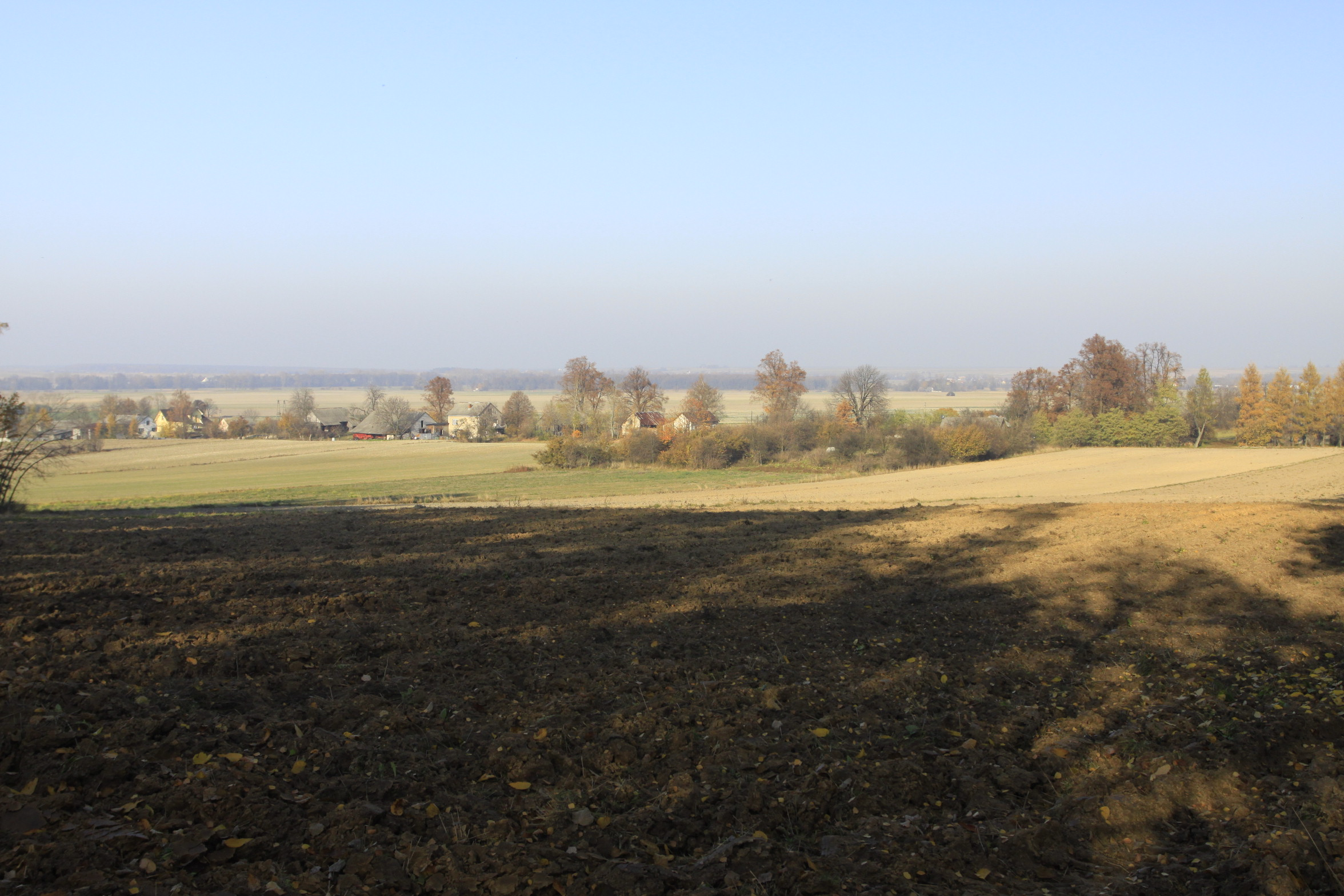 Widok na Zamiechówkę